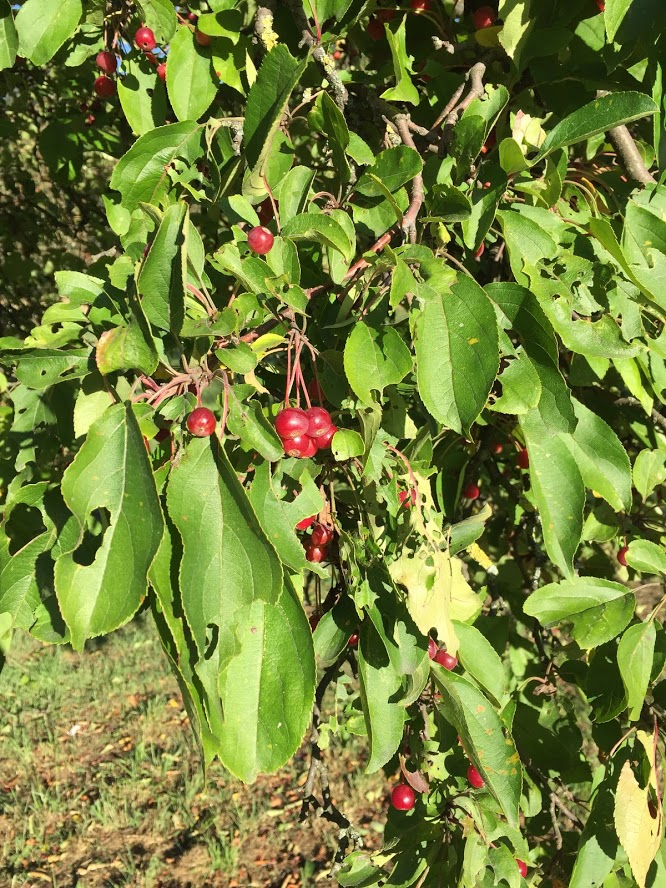 Fruits de Malus baccata